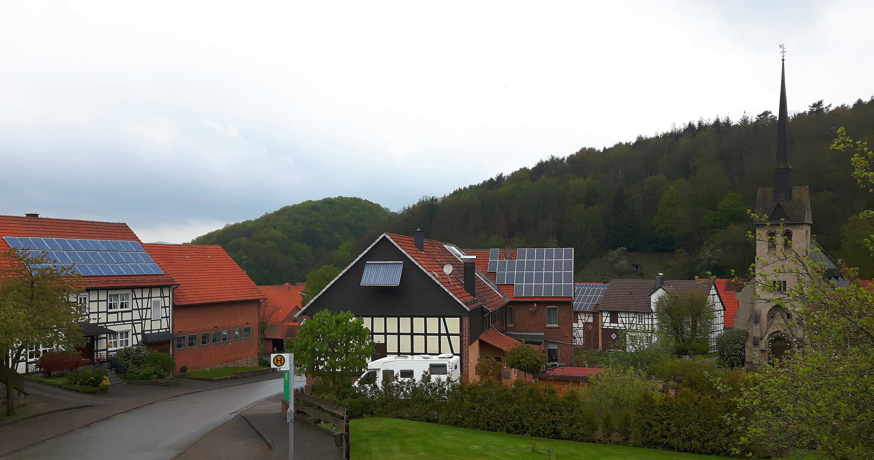 Wirmighausen, Gemeinde Diemelsee (Germany)